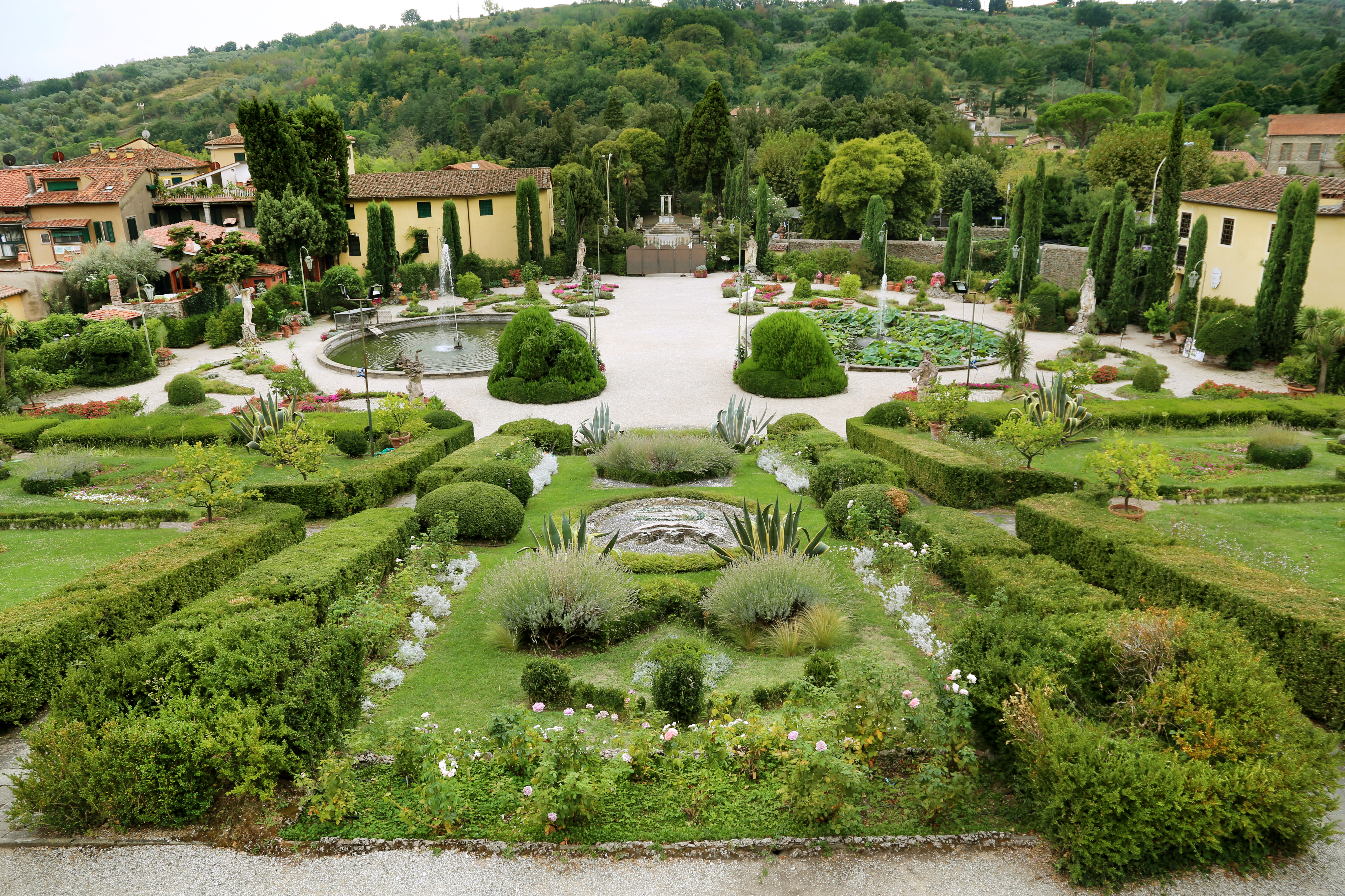 Giardino di Villa Garzoni This is a photo of a monument which is part of cultural heritage of Italy.